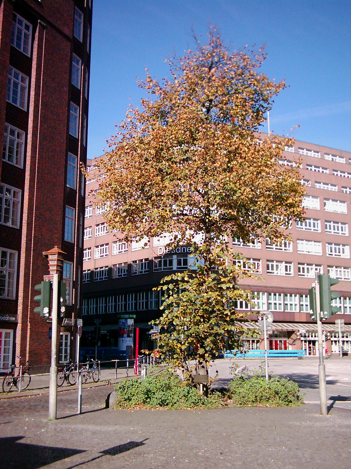 Linde am Gänsemarkt, gestiftet von der Firma Deutsche Unilever im Rahmen der Aktion "Bäume für Hamburg" von BILD Hamburg und Lorenz von Ehren, 14. März 1995. Siehe auch Image:Linde am Gänsemarkt Hamburg 03.jpg